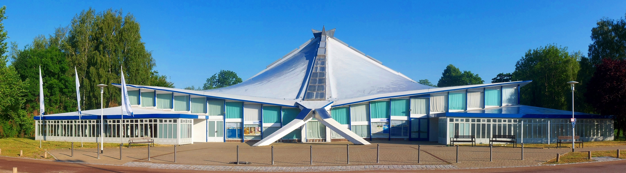 Panorama Stadthalle Neubrandenburg 2012